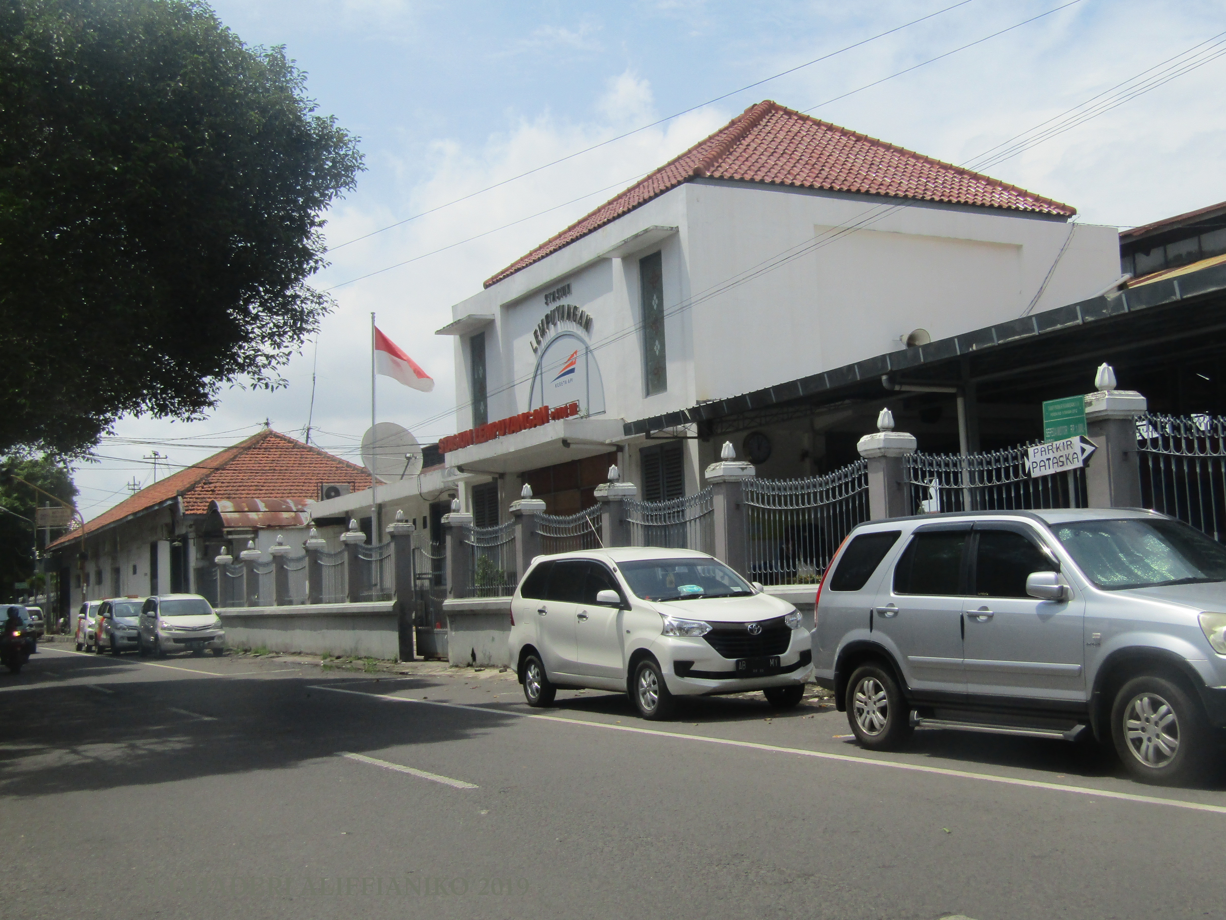 Tampak depan Stasiun Lempuyangan, 2019